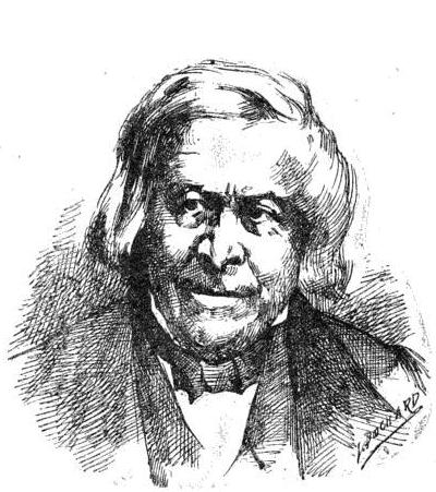 "Michelet"